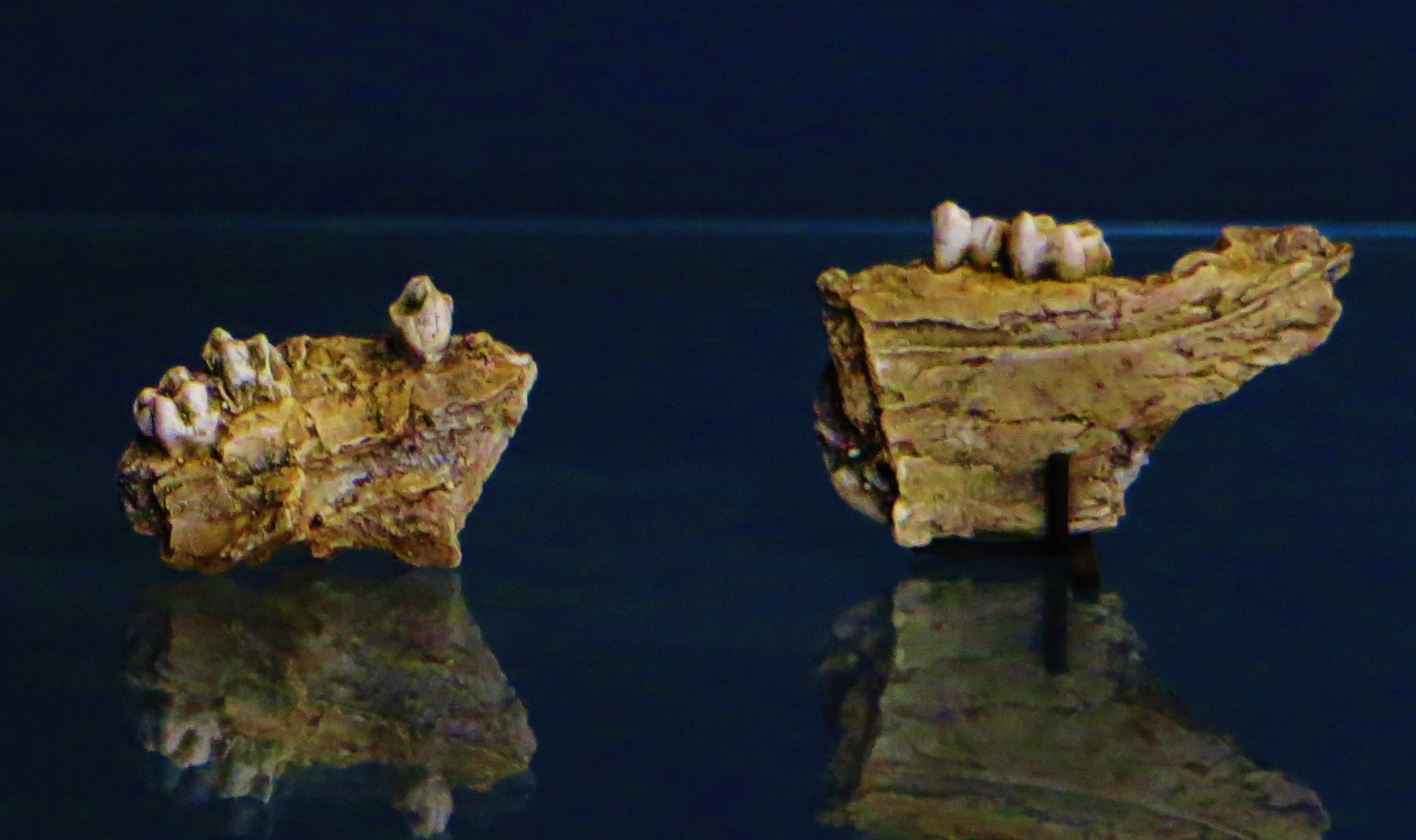 Fossil of Prohylobates, an extinct mammal - Took the photo at Musee d'Histoire Naturelle, Paris